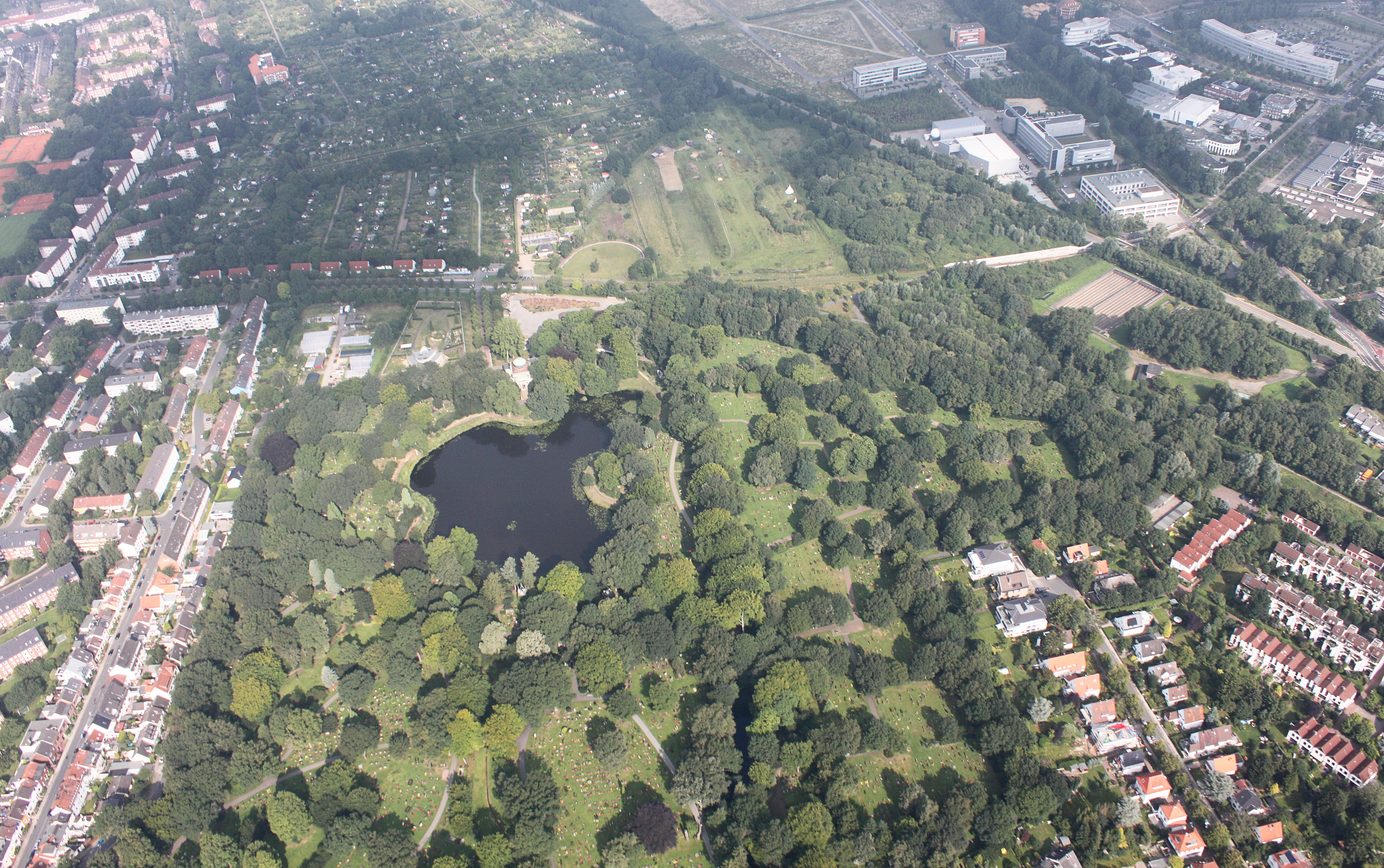 Luftaufnahme Bremen; entlang der A27; Uni Bremen; Flughöhe 500 m